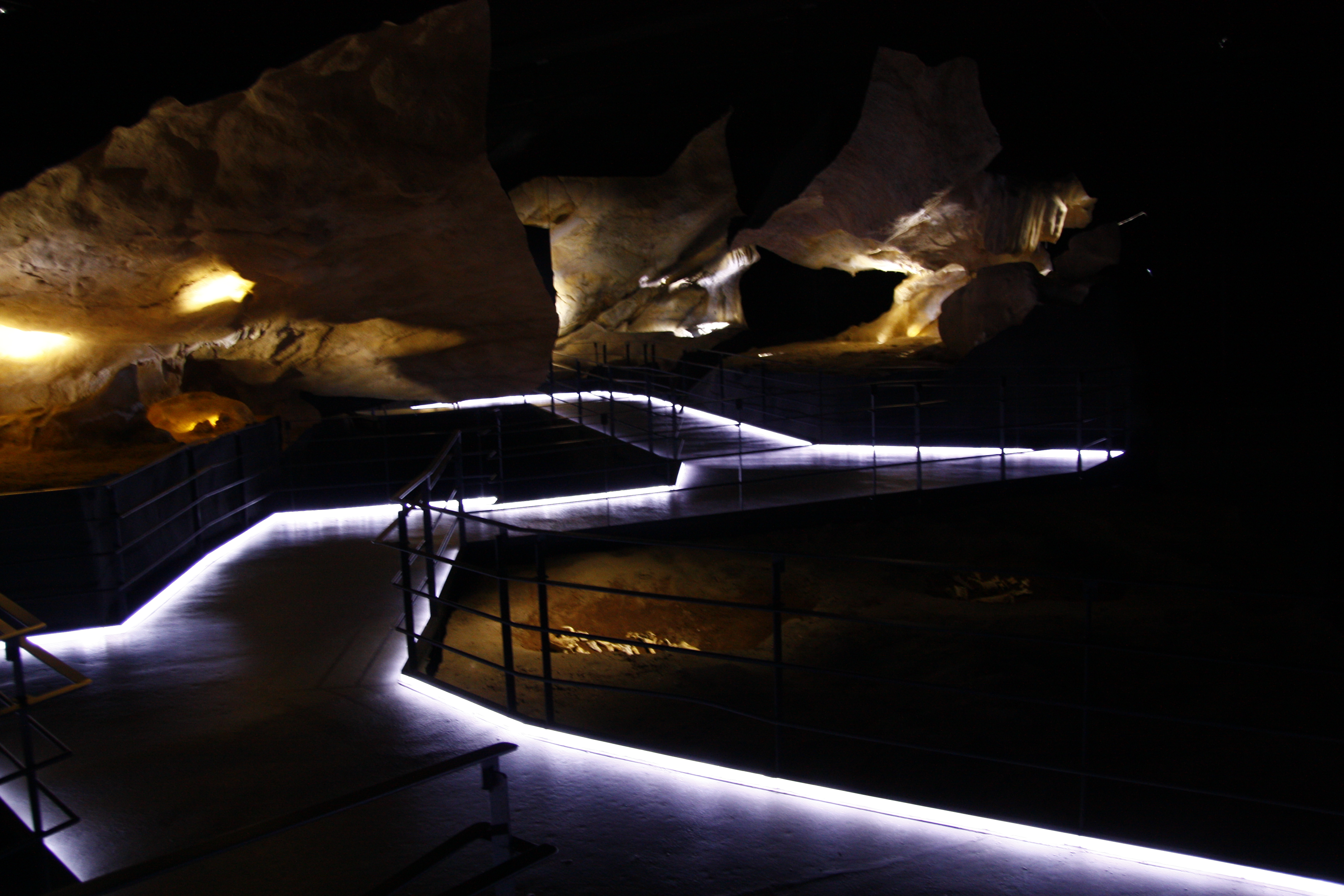 Ekainberriko erreplikaren ikuspegia.